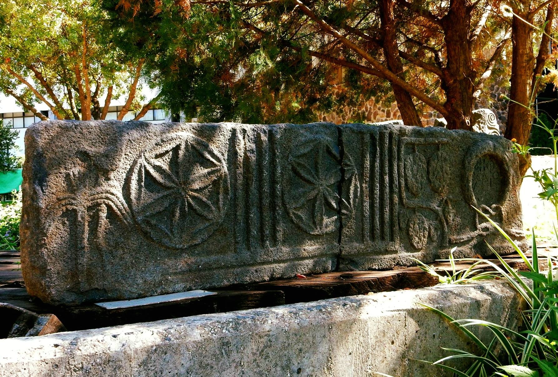 משקוף מהכנסיה הביזנטית. כתובת ביוונית: ספוס בן איוס - חספין. מוצג במוזאון עתיקות גולן בקצרין